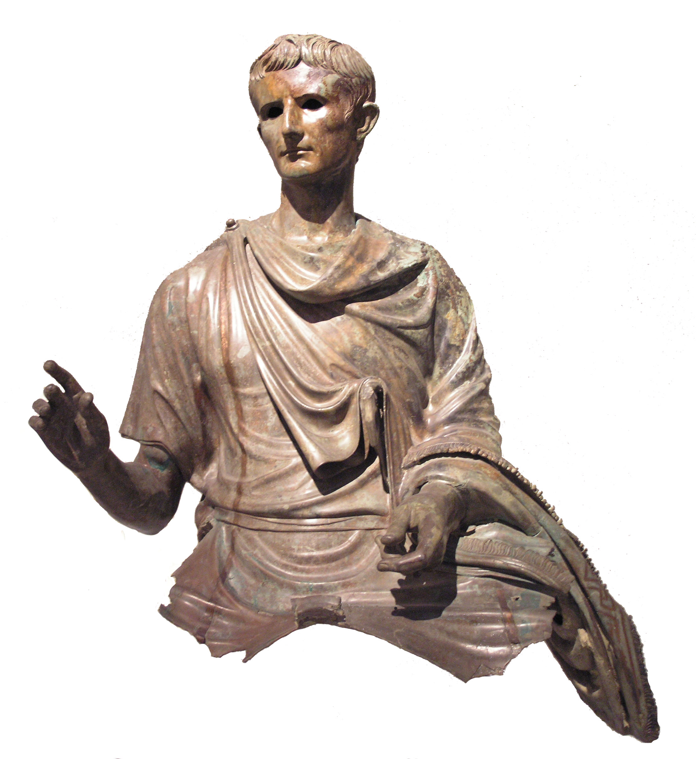 Statue équestre grandeur nature en bronze d'Octavien Auguste, la seule conservée, retrouvée dans une épave entre l'Eubée et l'île d'Aghios Eustratos. Auguste porte un long chiton et un manteau. Il tenait les rènes de la main gauche. Fin du Ier s. a. C. Musée archéologique national, Athènes, n°23322.